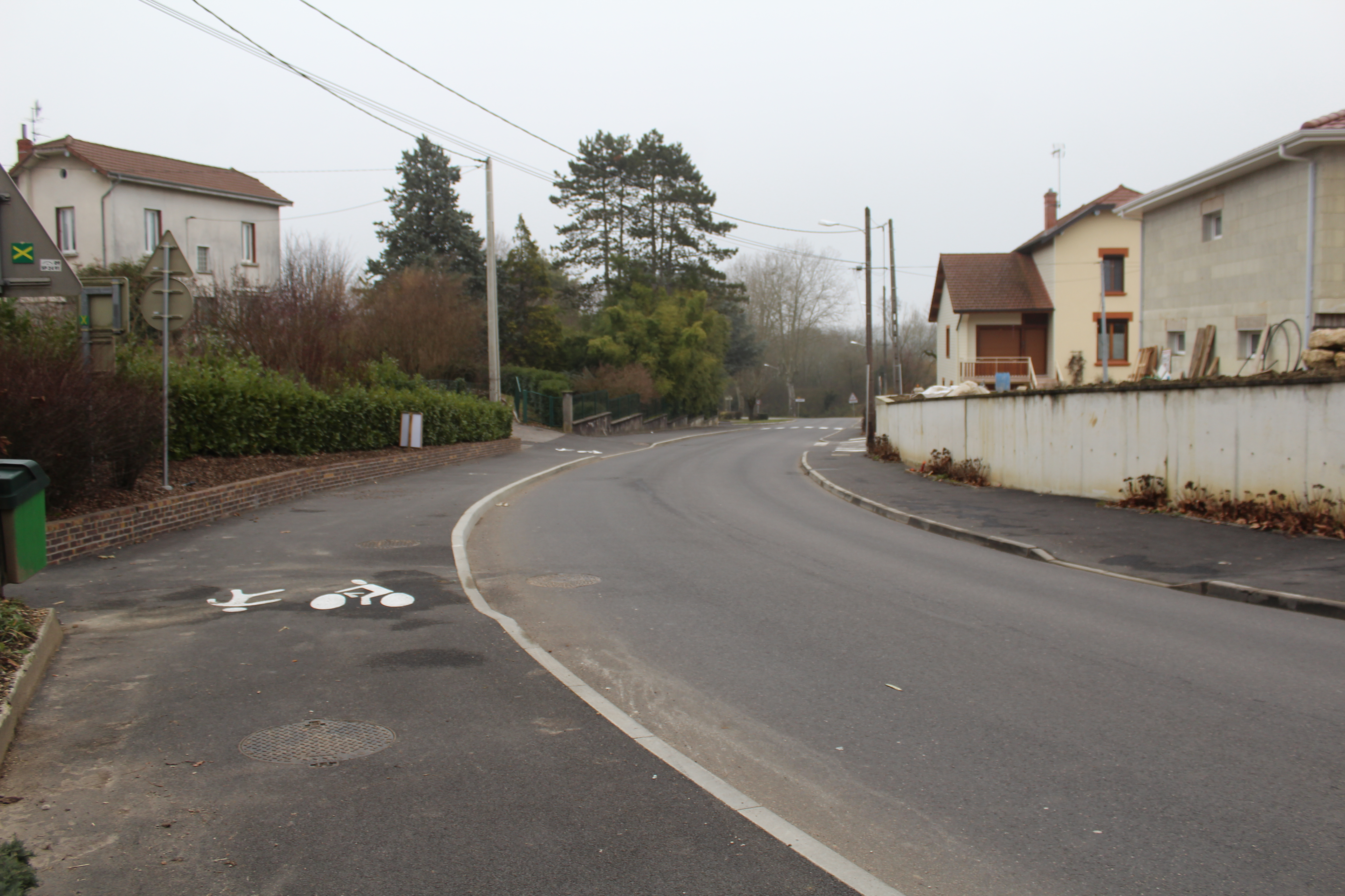 Route départementale 28 entre Malafretaz et Montrevel-en-Bresse. La partie gauche de la route est à Montrevel-en-Bresse, la partie droite est à Malafretaz.